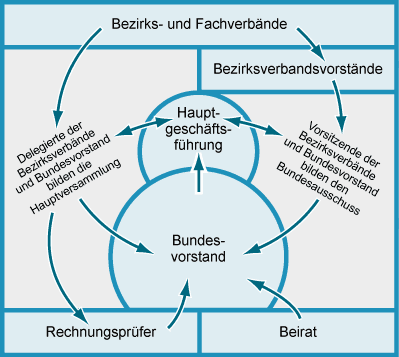 Grafik zeigt die Struktur des BVT Verbandes